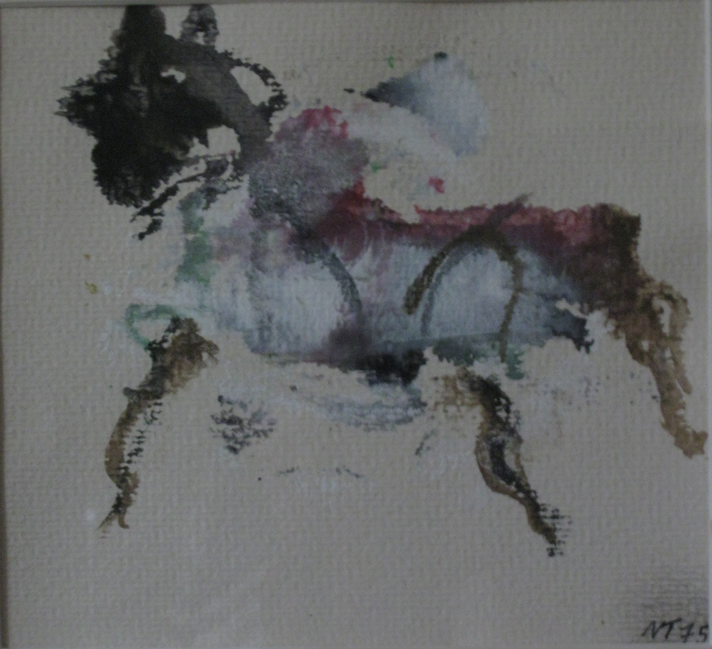 Pferd